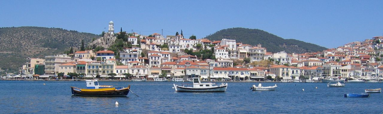 Poros from balatas